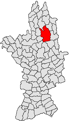 Categorie:Hărţi ale judeţului Olt